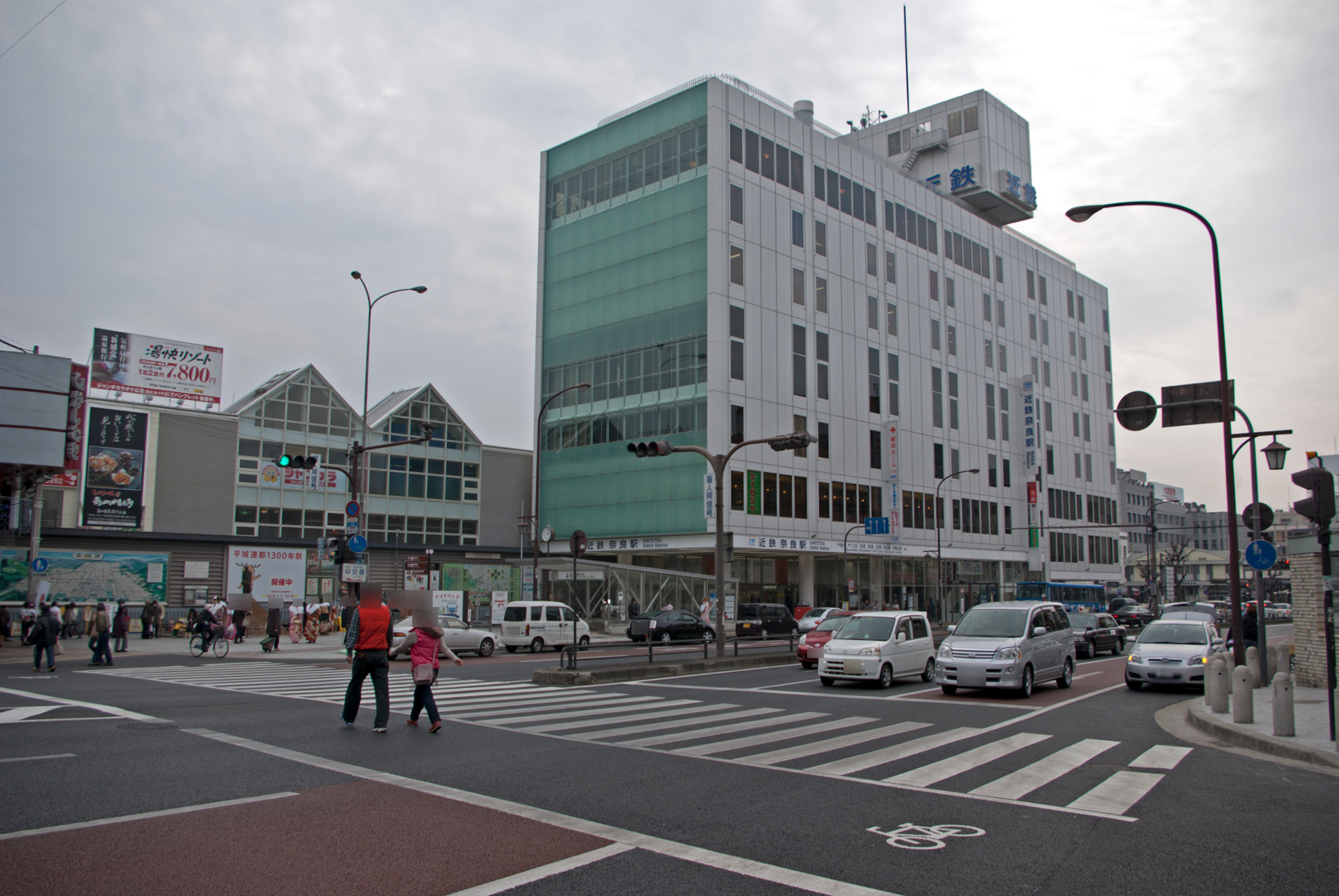 近鉄奈良線近鉄奈良駅